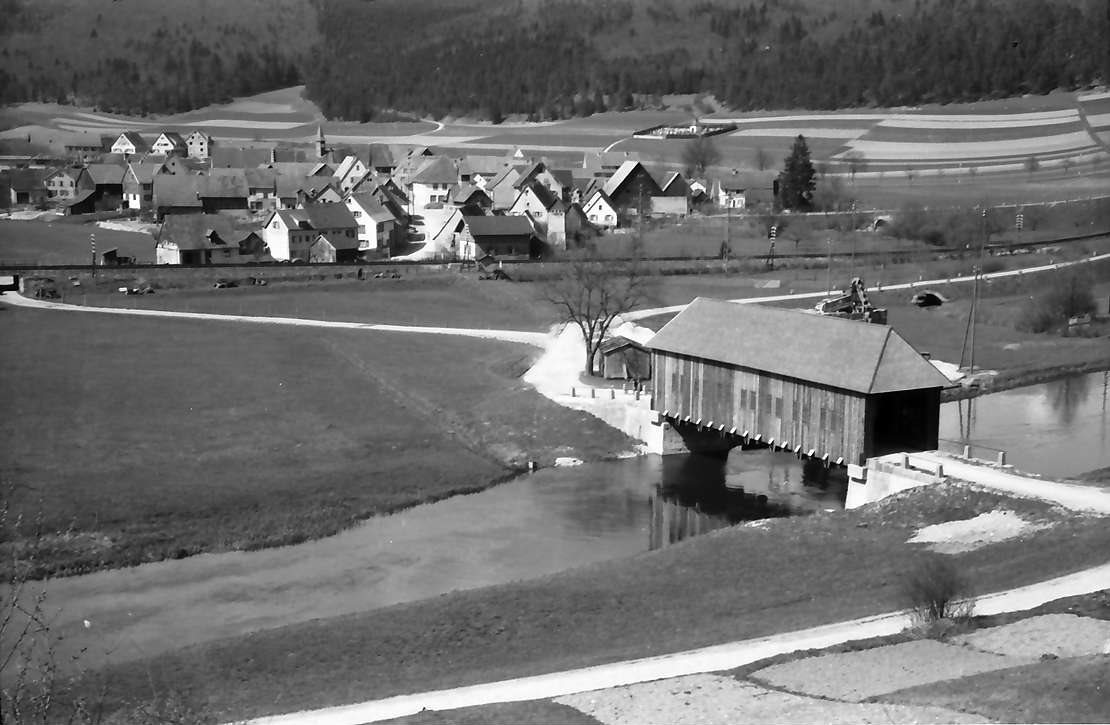 Überdachte Holzbrücke über die Donau und Ortskern von Zimmern, Gemeinde Immendingen